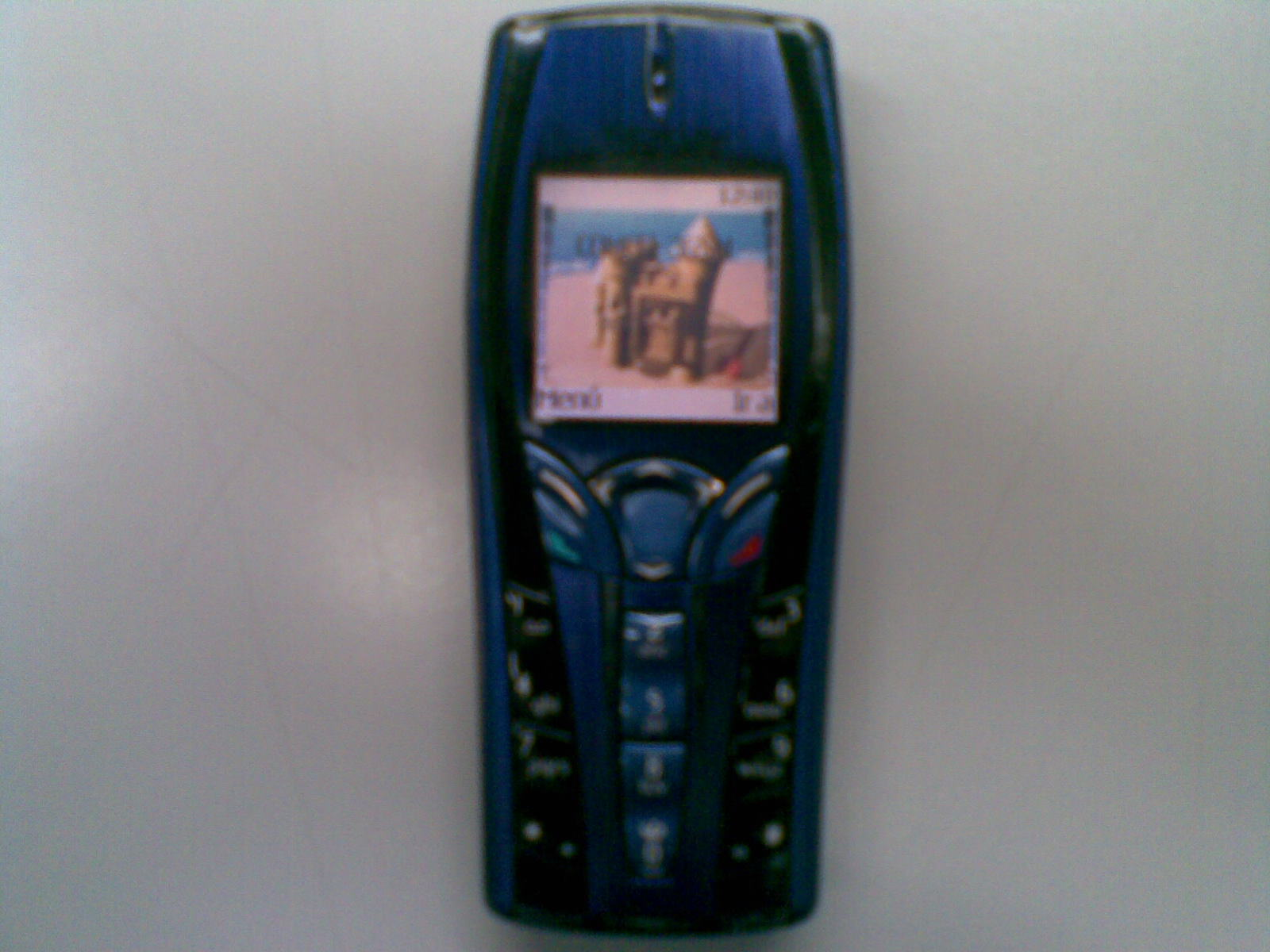 nokia 7250